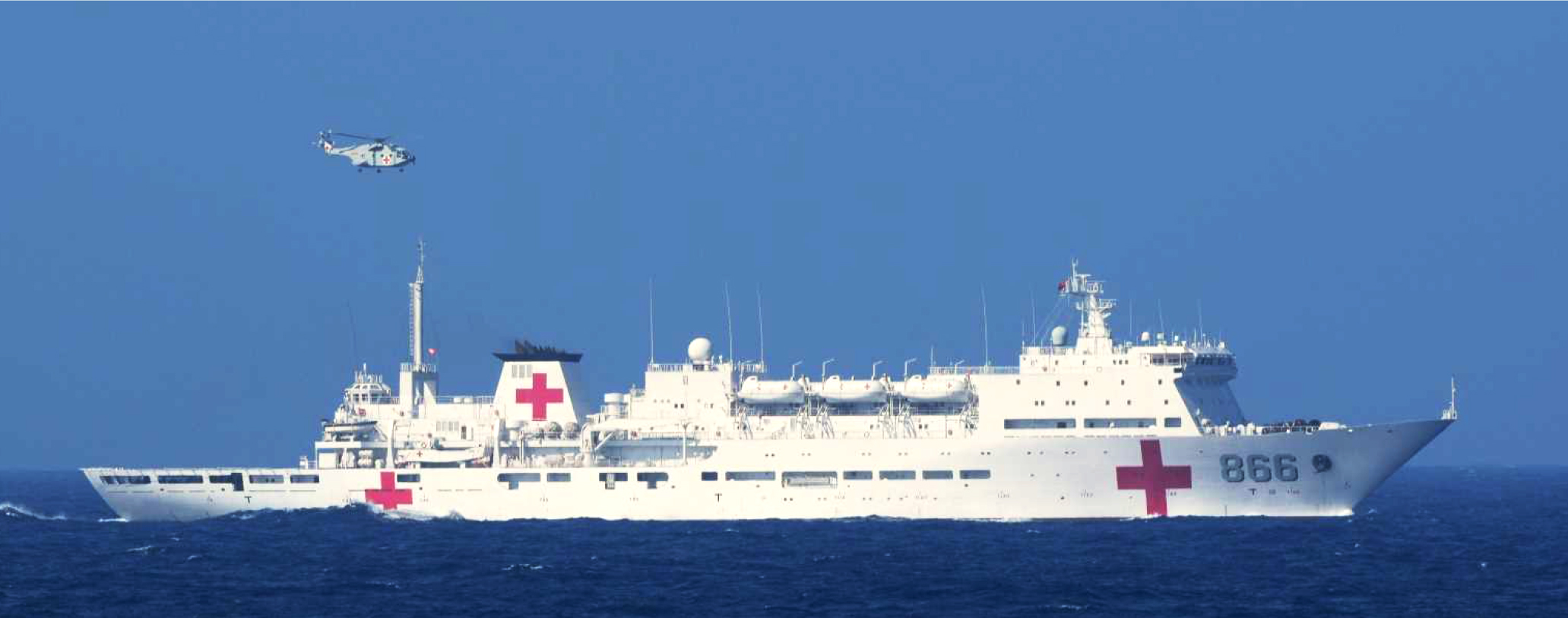 ６月１６日（木）午後２時頃から午後４時頃にかけて、海上自衛隊第１２護衛隊所属「あぶくま」（呉）及び第５航空群所属「Ｐ－３Ｃ」（那覇）が、宮古島の北東約１１０ｋｍの海域を東シナ海から太平洋に向けて南東進する中国海軍ルーヤンⅡ級ミサイル駆逐艦１隻、ジャンカイⅡ級フリゲート１隻、ダーラオ級潜水艦救難艦１隻、フチ級補給艦１隻及びアンウェイ級病院船１隻を確認した。